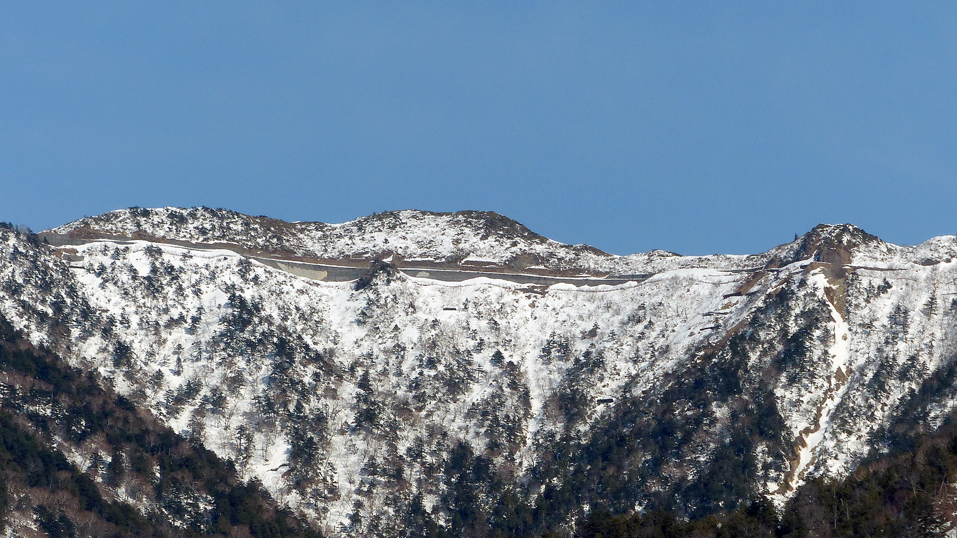 日光市横川から見た鹿又岳周辺。稜線付近の山肌に見える栃木県道266号中塩原板室那須線の廃道区画（塩那道路）を望遠で撮影。